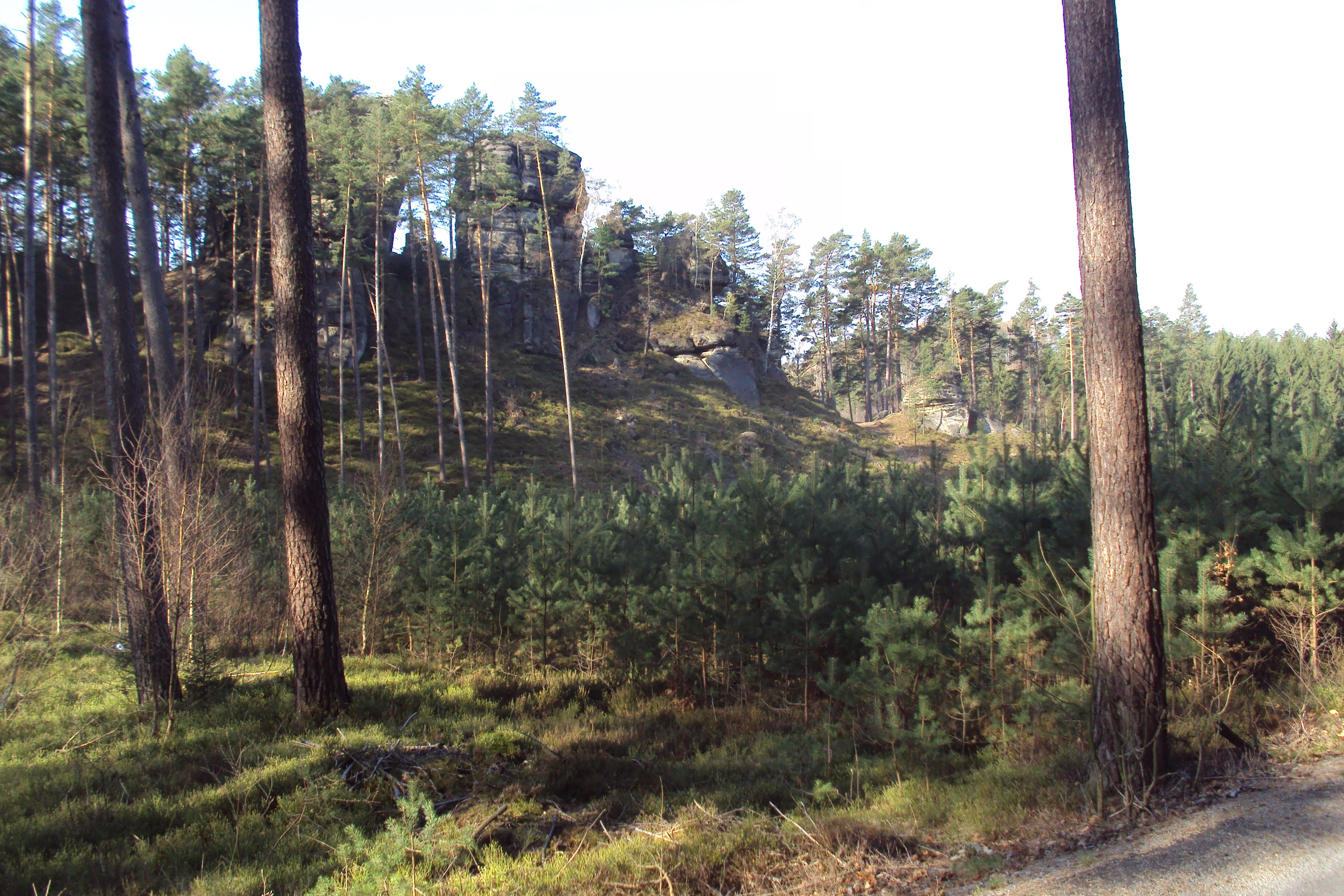 Havraní skály nedaleko Nového Boru, katastr Radvanec, Lužické hory